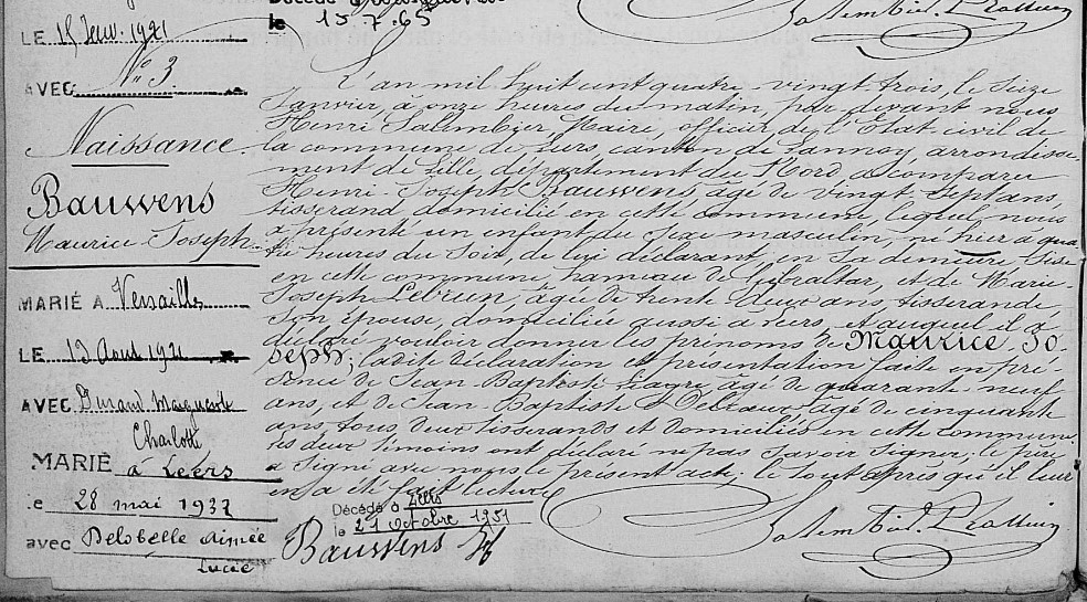 Registre des naissances de la commune Leers, année 1883, 1er feuillet, verso, acte n° 3.